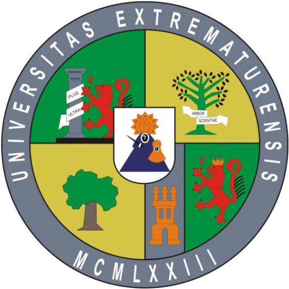 Escudo usado en las instituciones de la Universidad de Extremadura